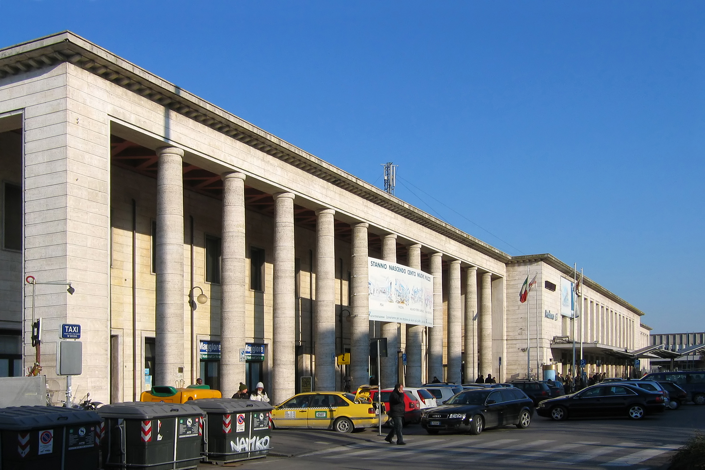 Il Fabbricato Viaggiatori della stazione di Padova.